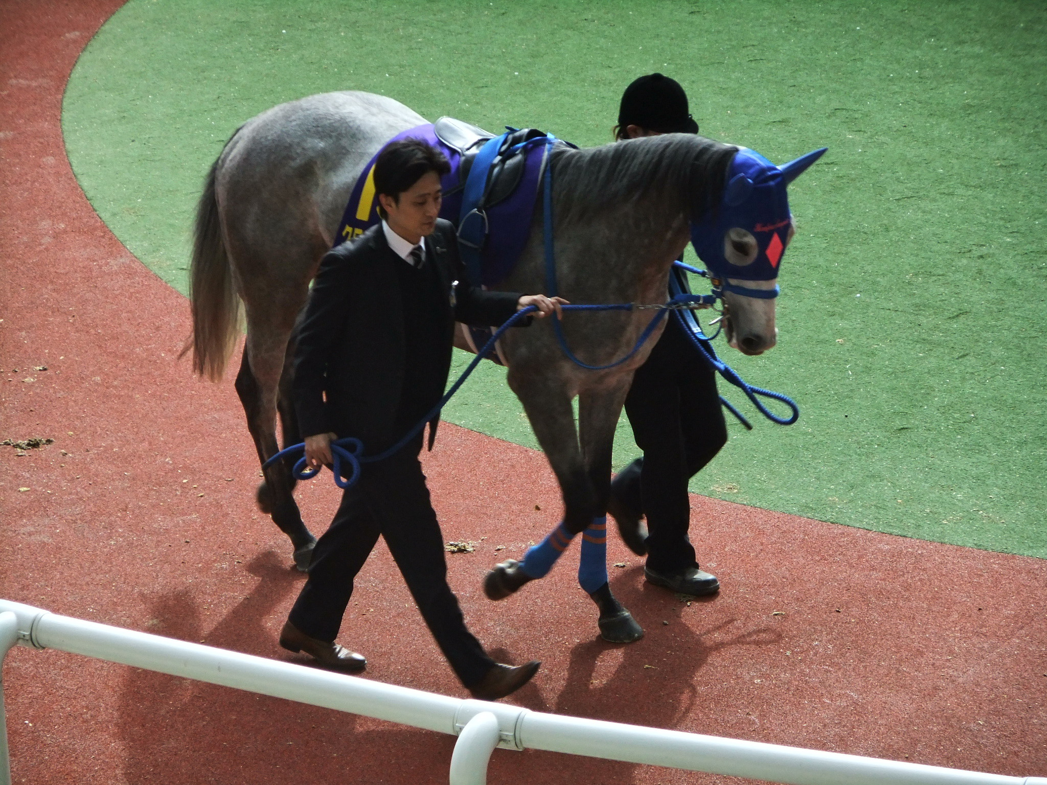 クロフネサプライズ 2013年4月7日 阪神競馬場